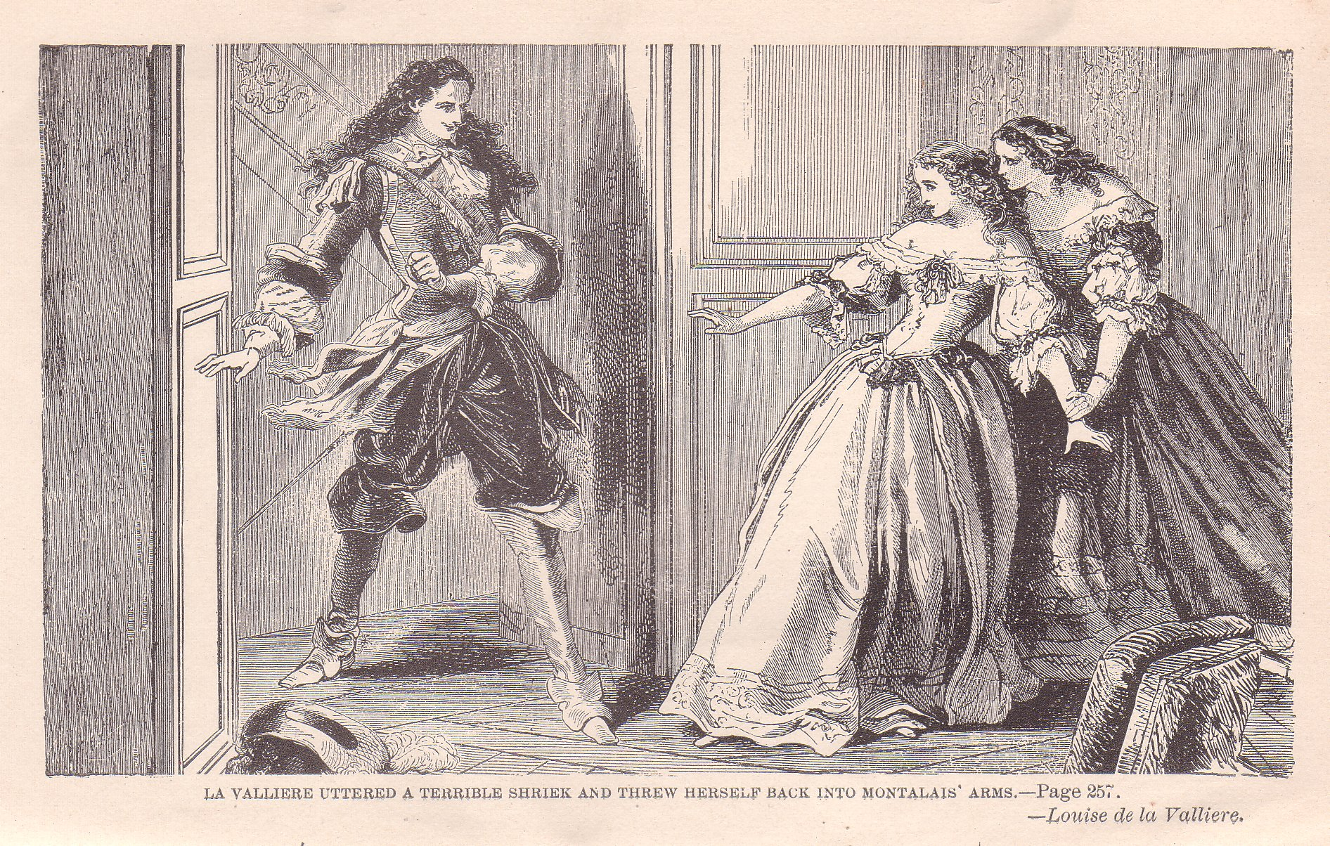 Slečna Valliere uchopila slečnu Auru de Montalais, když uvidila Raula.